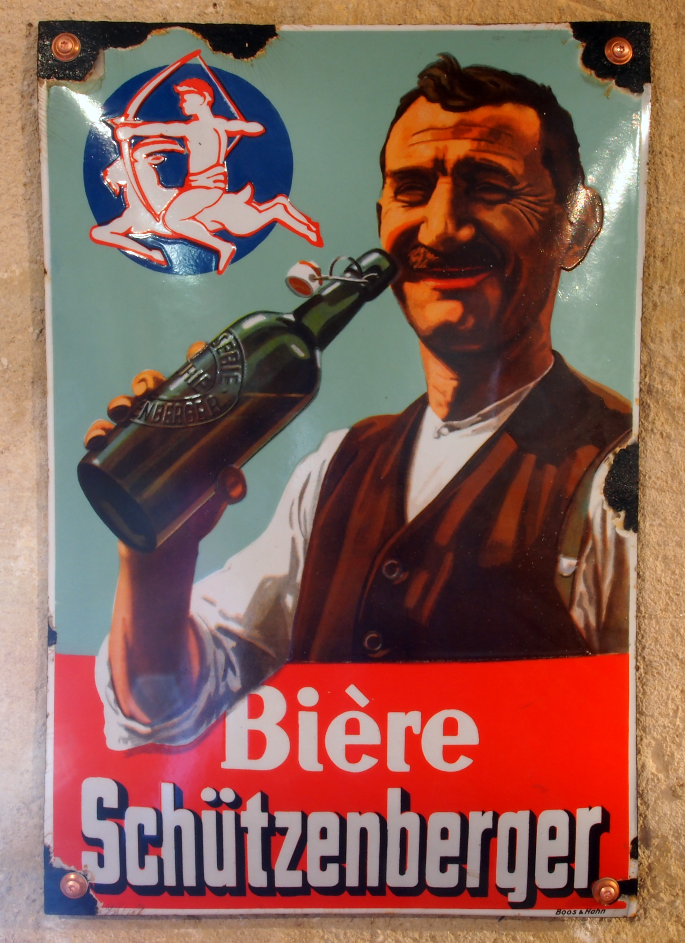 Bière Schützenberger , enamel advertising sign at the Musée Européen de la Bière.